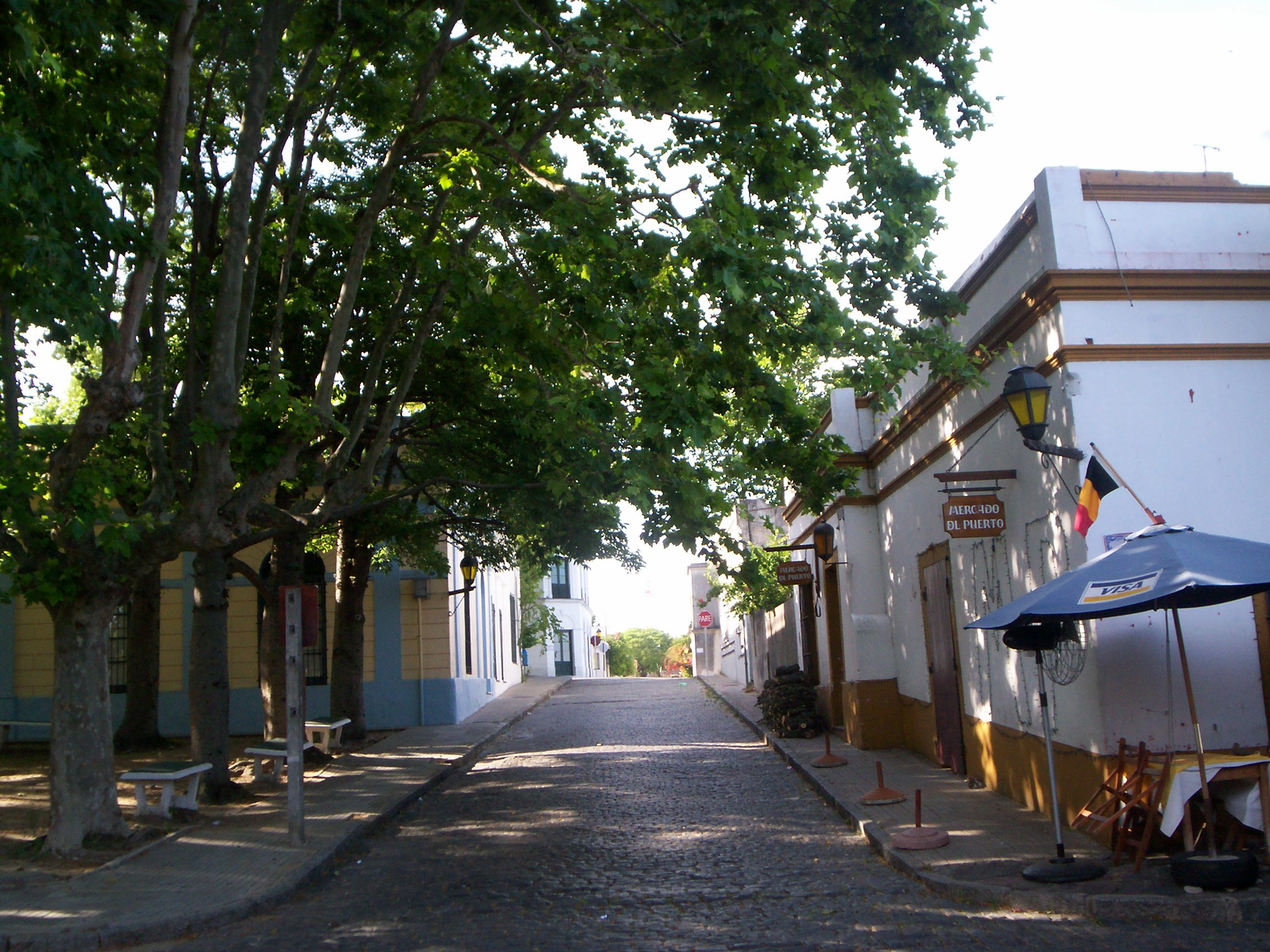 Colonia del Sacramento (Uruguay). Imagen tomada el 27 de noviembre de 2005.